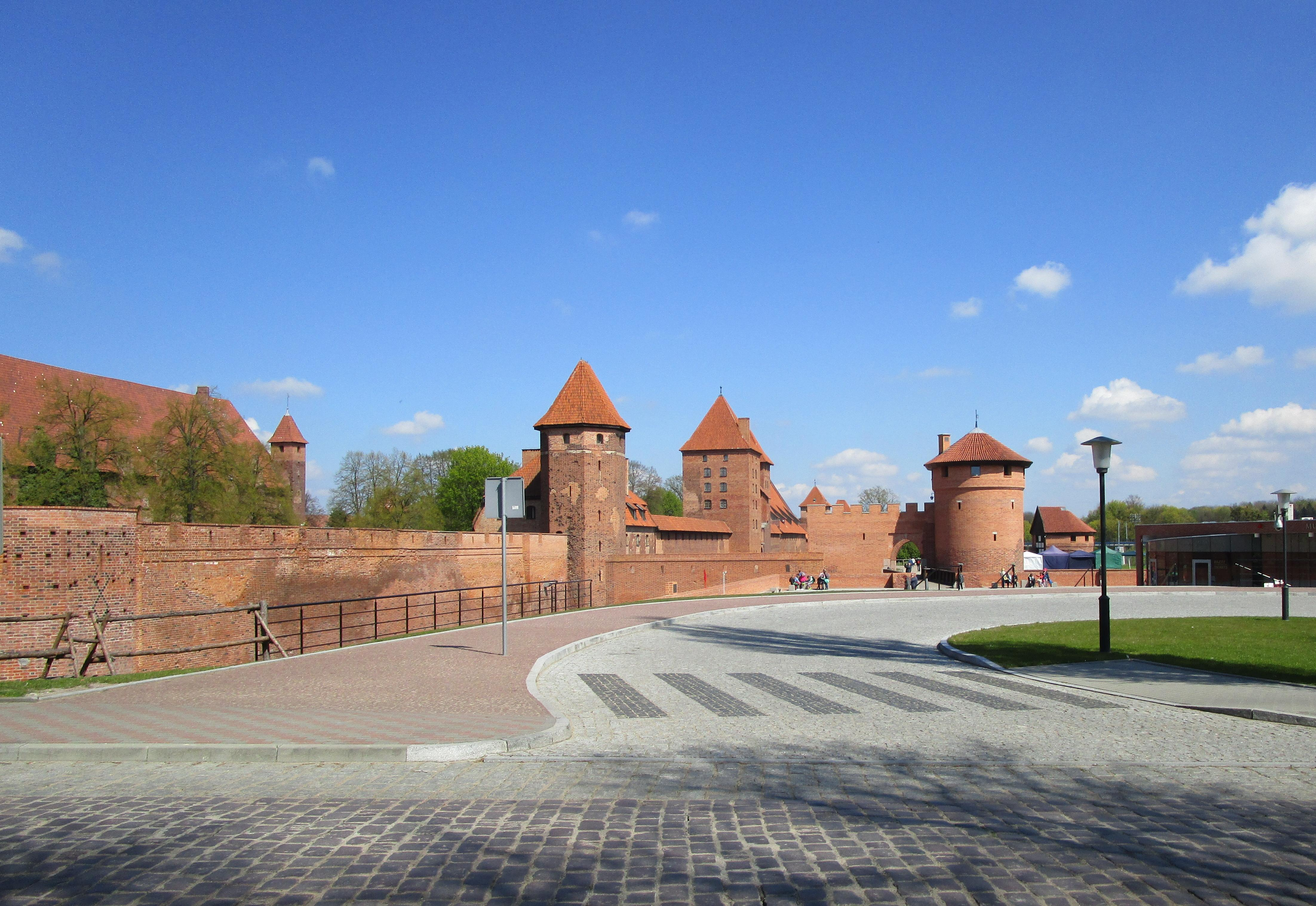 Die östlich vorgelagerten Außenbefestigungen